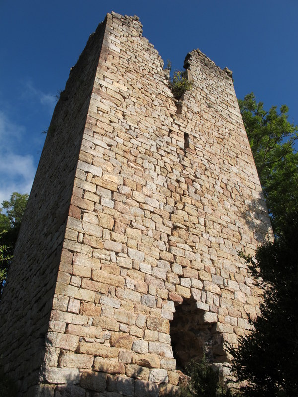 Torre Cavallera - Camprodon a la comarca del Ripollès - Catalunya